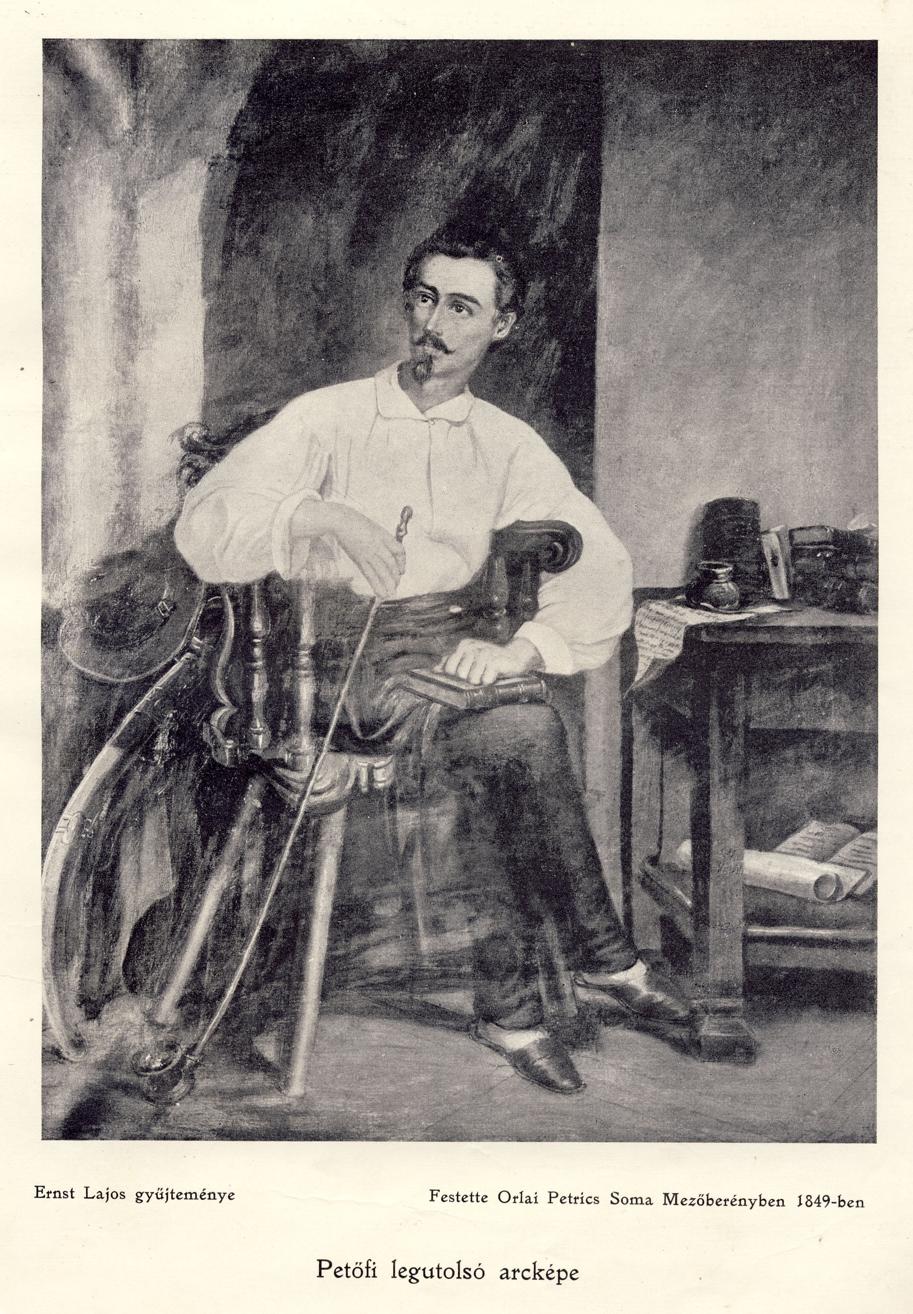 Petőfi Sándor utolsó ismert arcképe - Orlay Petrich Soma festménye, 1849. Mezőberény.